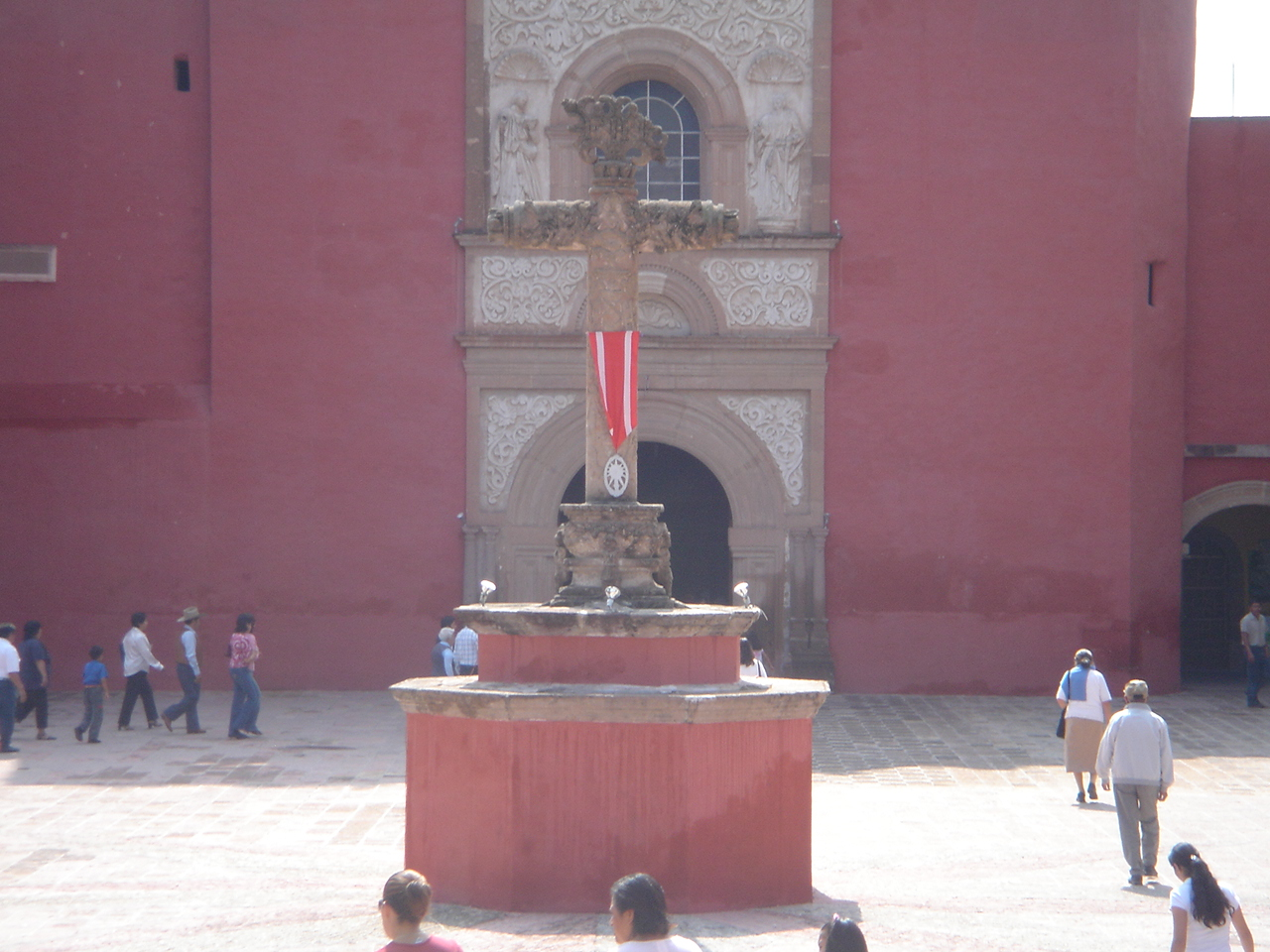 Cruz monumental labrada en una sola pieza de cantera rosa en el atrio de la parroquia de San Mateo